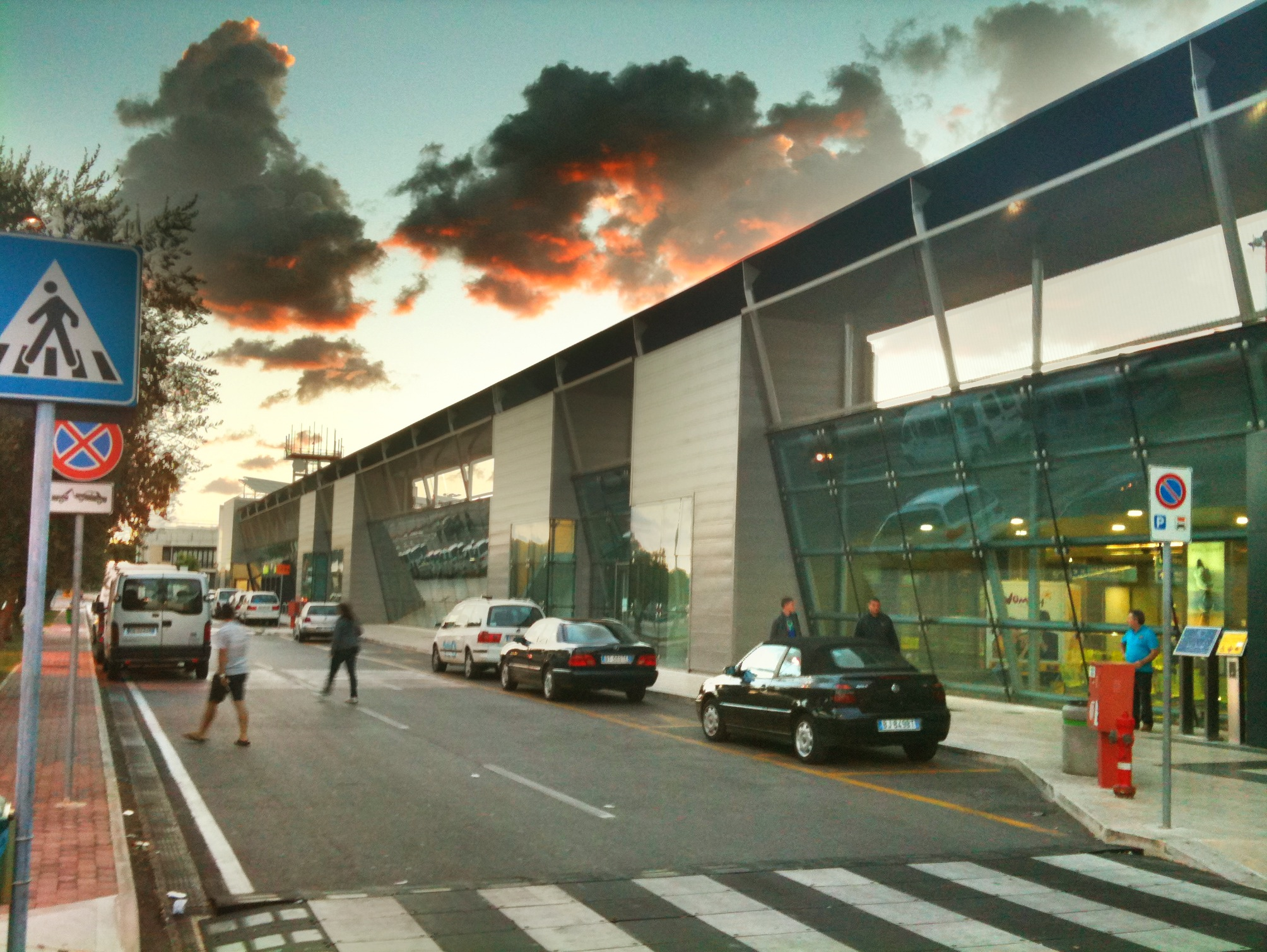 Aereoporto Brindisi Papola-Casale (BDS)